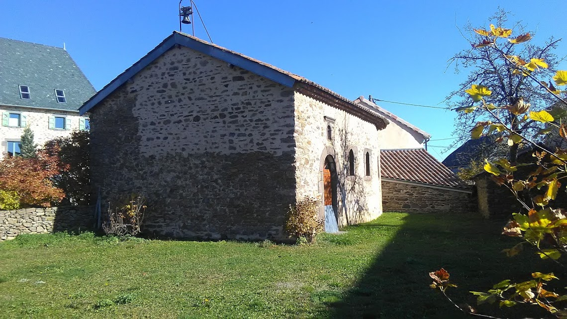 Chapelle du village du Pirou, commune de Saint-Georges, département du Cantal